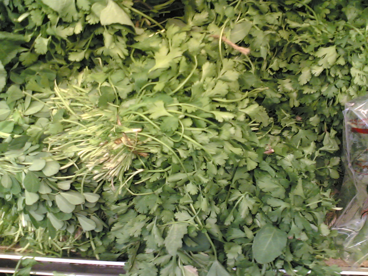 മല്ലിയില